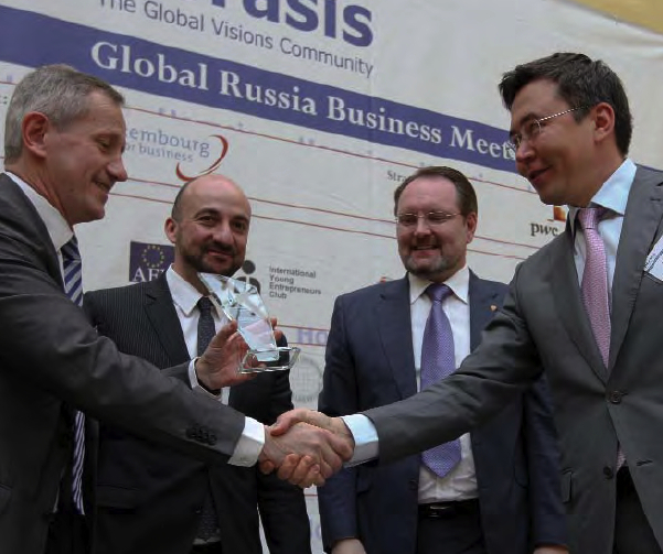 Церемония вручения звания “Российский бизнесмен года – 2012” 23 апреля 2012 года (слева направо): Управляющий директор PwC Didier Mouget, Министр торговли Люксембурга Etienne Schneider [1], Статс-секретарь министерства экономического развития РФ Манылов, Игорь Евгеньевич, Салават Резбаев.